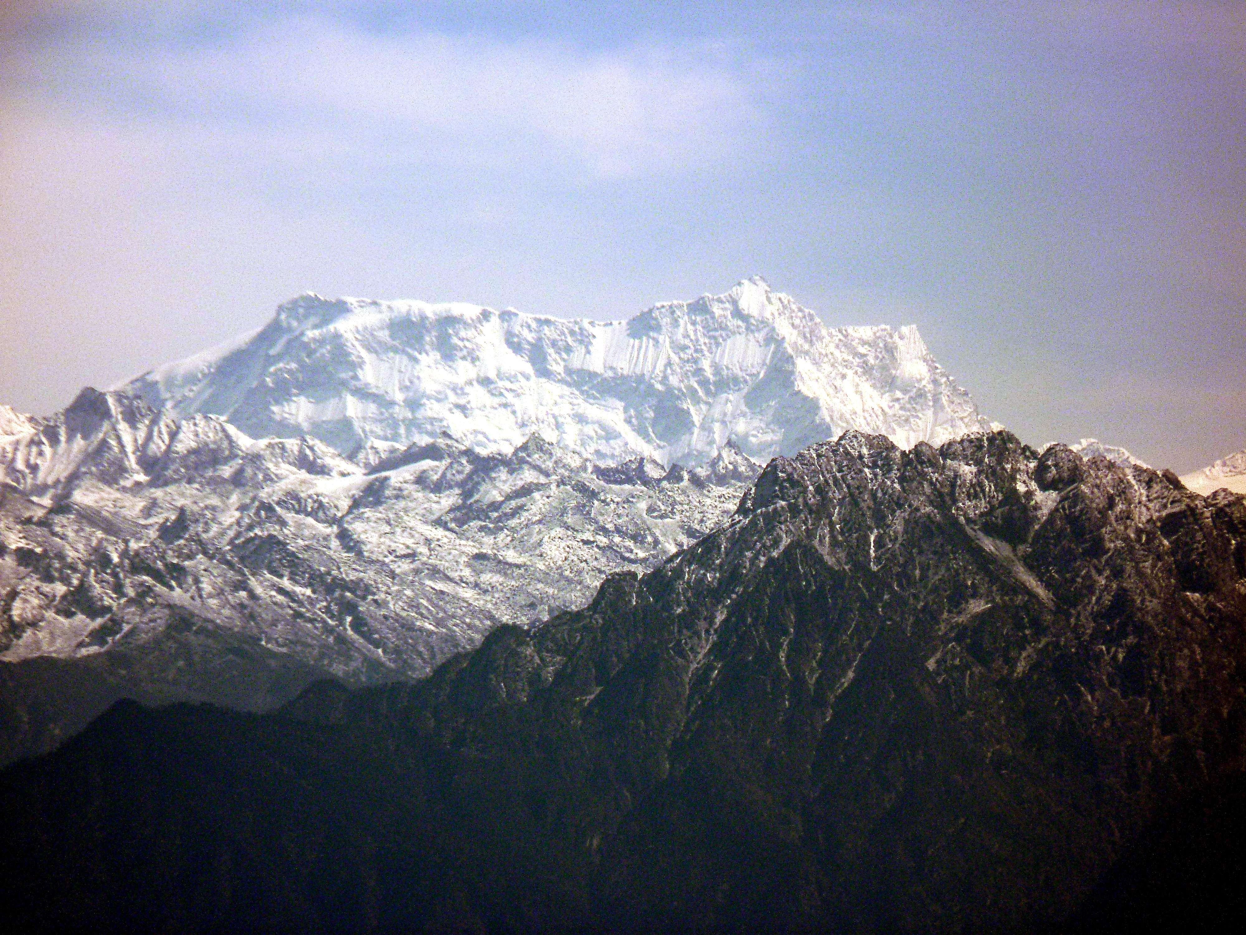 082 - Gangkar Puensum - 7,570m (Dochula pass)